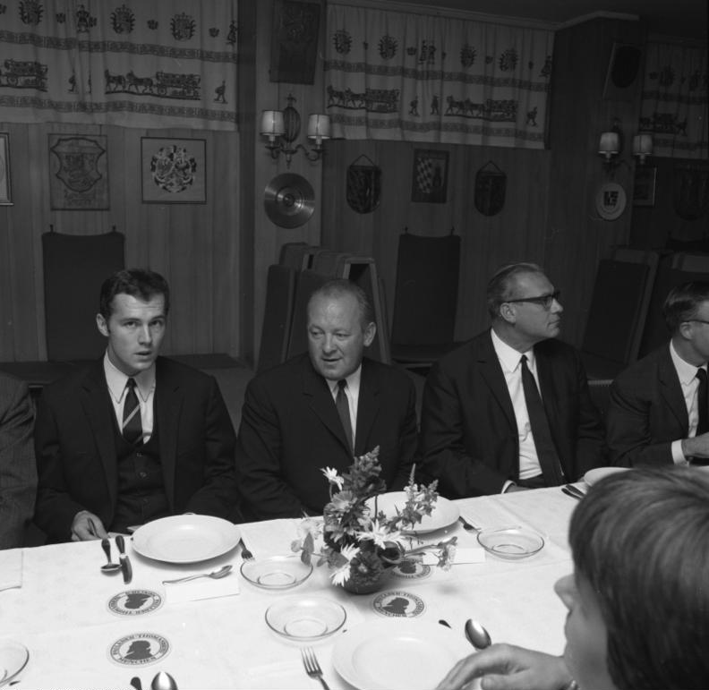 Staatsmin. Heubl, Bayer. Landesvertretung, empfängt die Fußballmannschaft Bayern-München (Europa-Cup-Sieger)